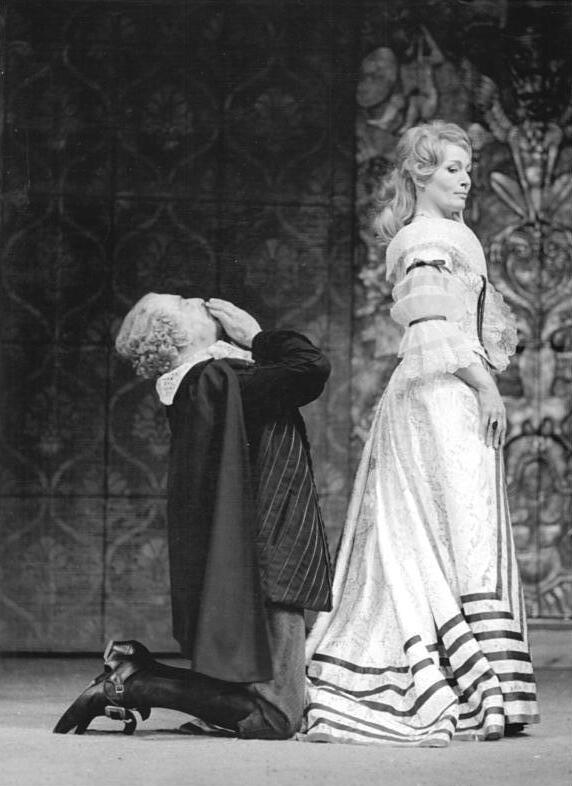 Zentralbild-Franke -30.12.1963 Berlin: Premiere "Der Tartüff" in den Kammerspielen. Moliéres Komödie "Der Tartüff", übersetzt von Benne Besson und Hartmut Lange, erlebt am Silvesterabend 1963 ihre Premiere in den Kammerspielen. Regie führt Benno Besson, Bühnenbild und Kostüme schuf Horst Sagert. UBz: Eine Szene aus der Komödie mit Inge Keller als Elmire und Fred Düren als Tartüff.